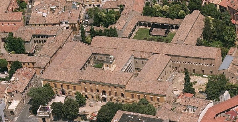 L'edificio che ospita la Biblioteca Malatestiana, Cesena.